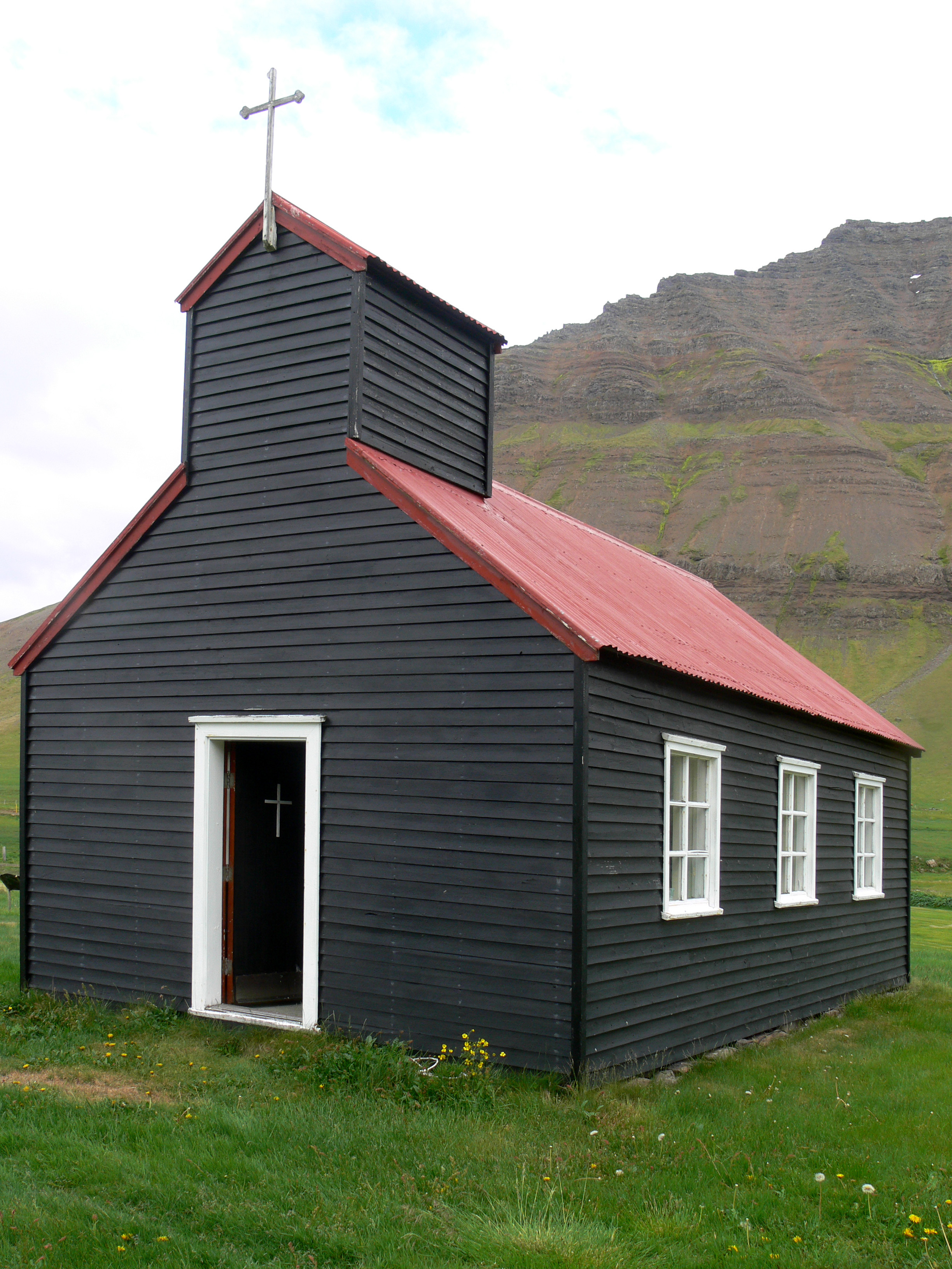 Kirche in Kirkjuból im Önundarfjörður.